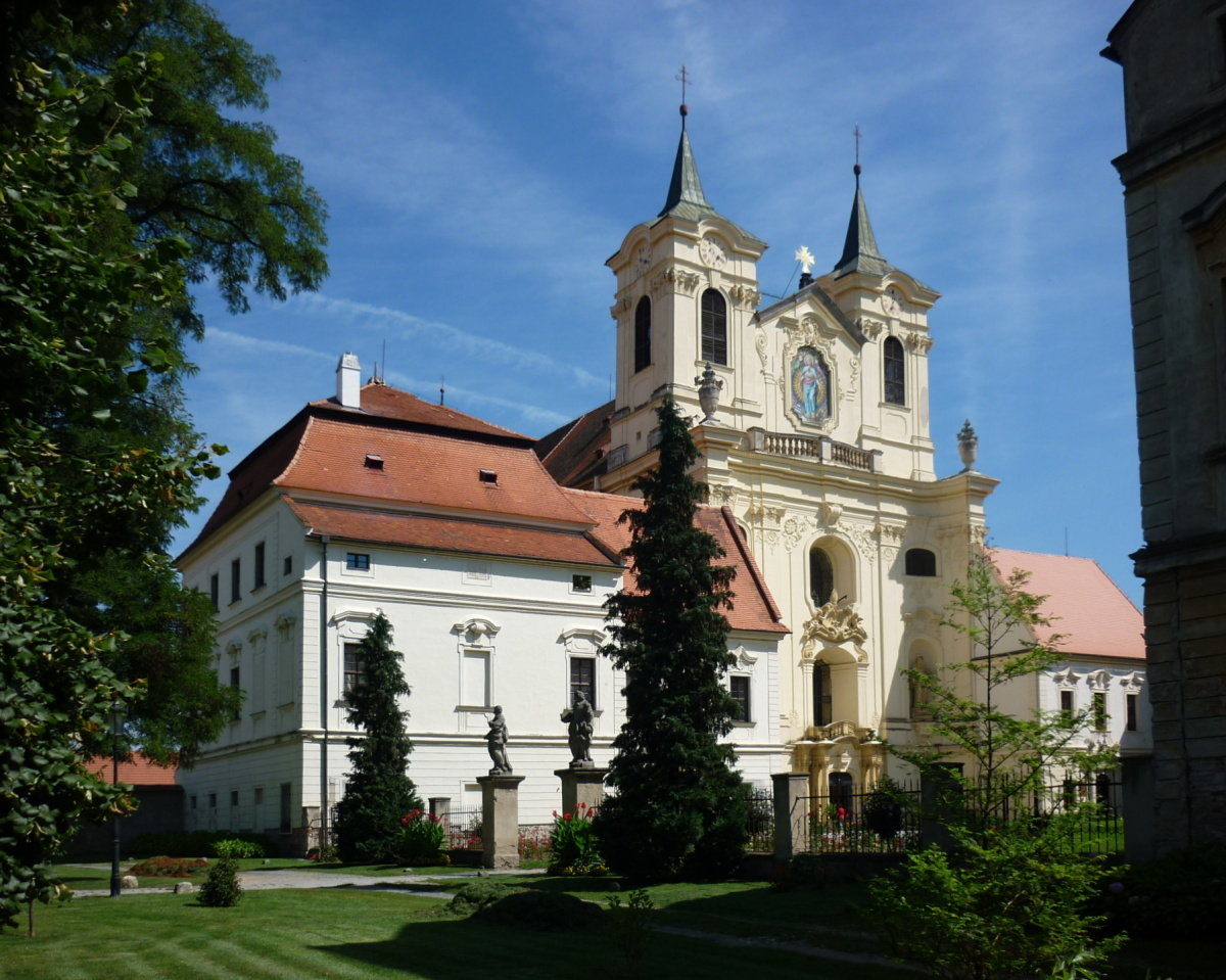 Benediktinský klášter v Rajhradu